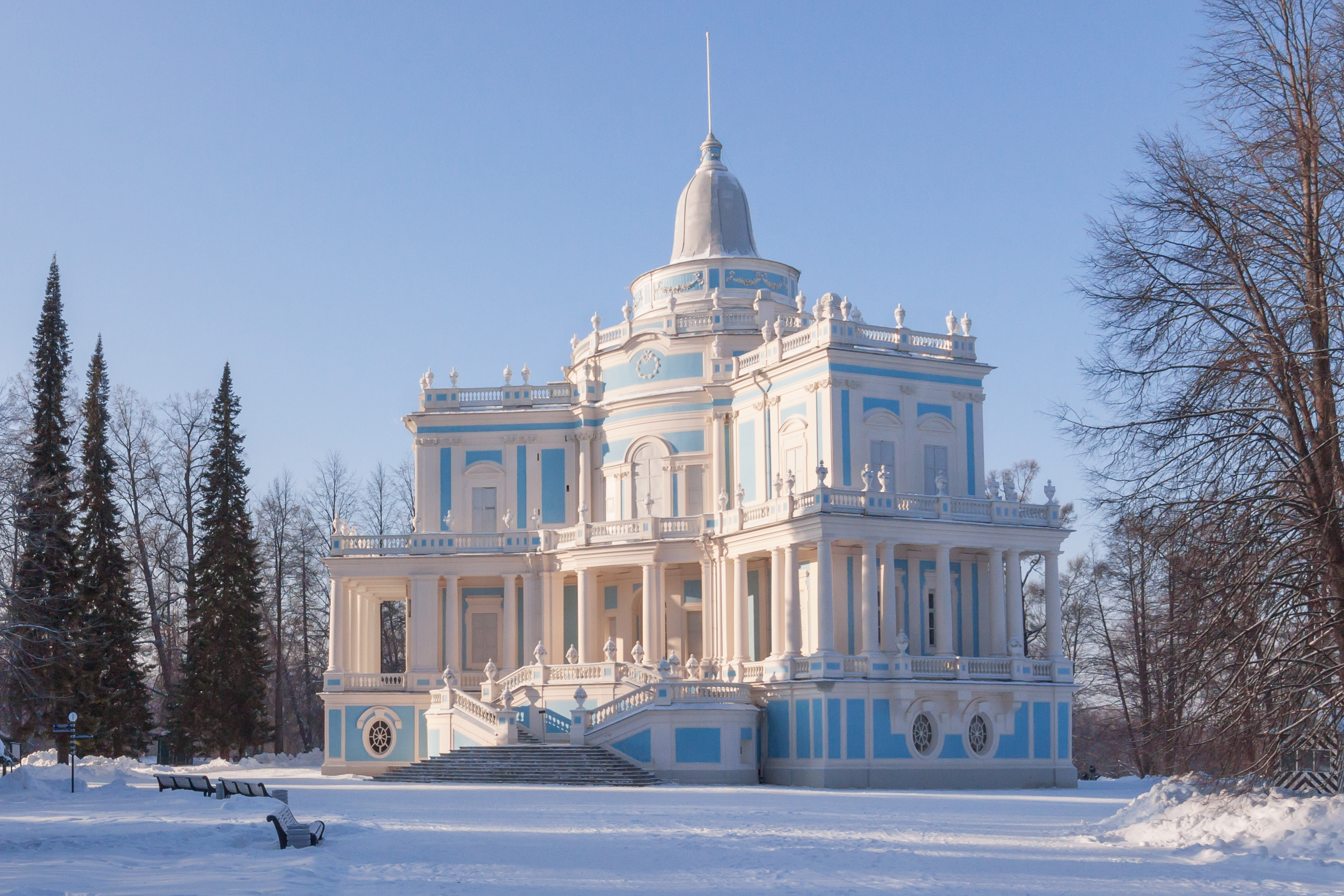 Павильон Катальной горки: северо-западная часть Верхнего парка, Ломоносов, Петродворцовый район, Санкт-Петербург